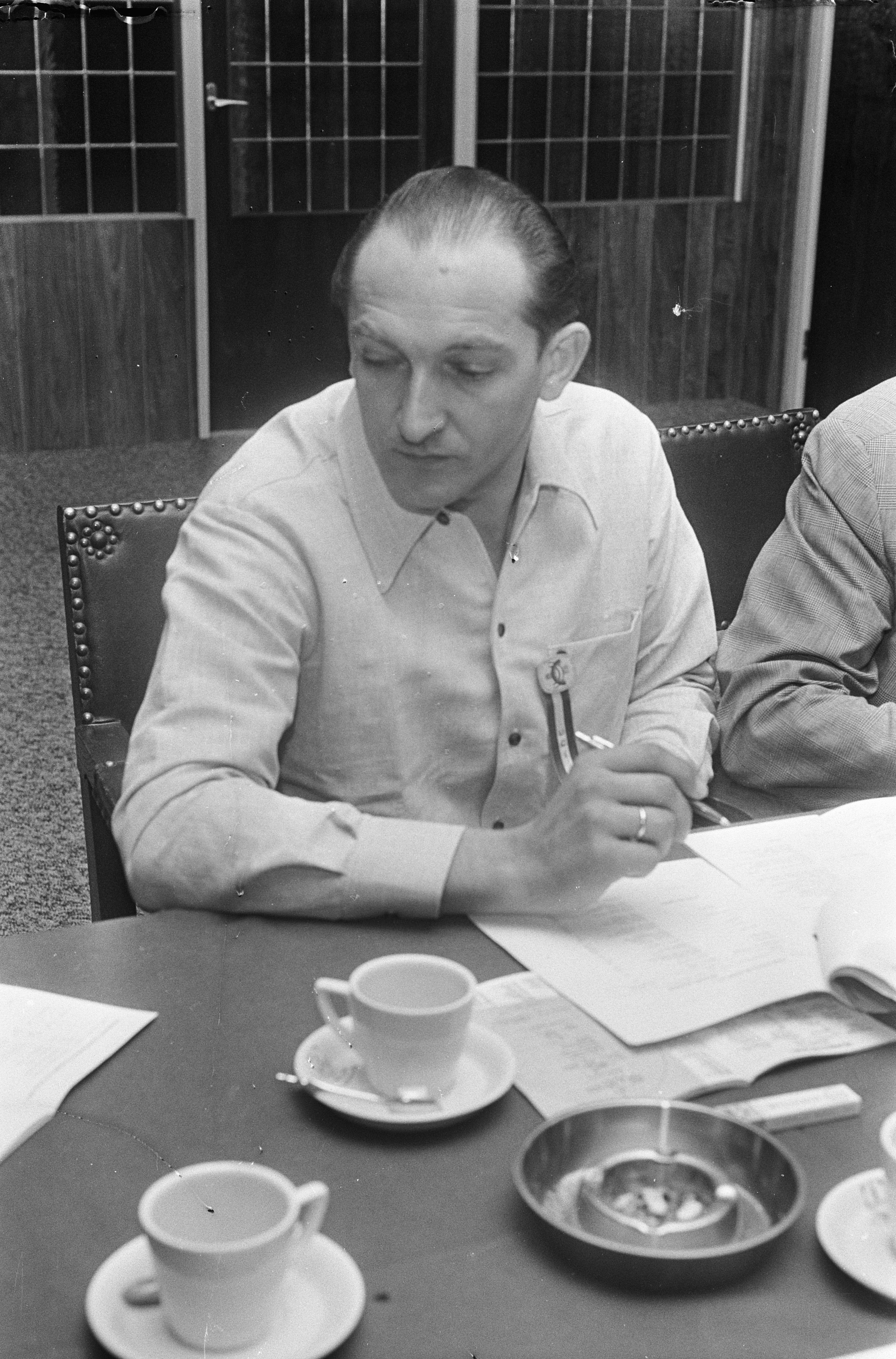 Collectie / Archief : Fotocollectie Anefo Reportage / Serie : [ onbekend ] Beschrijving : Wielrennen wereldkampioenschappen op de baan in Olympisch Stadion Amsterdam. Ploegleider DDR Heinz Dietrich tijdens vergadering indeling series sprint / Datum : 22 augustus 1967 Locatie : Amsterdam, D.D.R., Duitsland Trefwoorden : SPRINTEN, Vergaderingen, WIELRENNEN, stadions, wereldkampioenschappen Fotograaf : Koch, Eric / Anefo Auteursrechthebbende : Nationaal Archief Materiaalsoort : Negatief (zwart/wit) Nummer archiefinventaris : bekijk toegang 2.24.01.05 Bestanddeelnummer : 920-6205